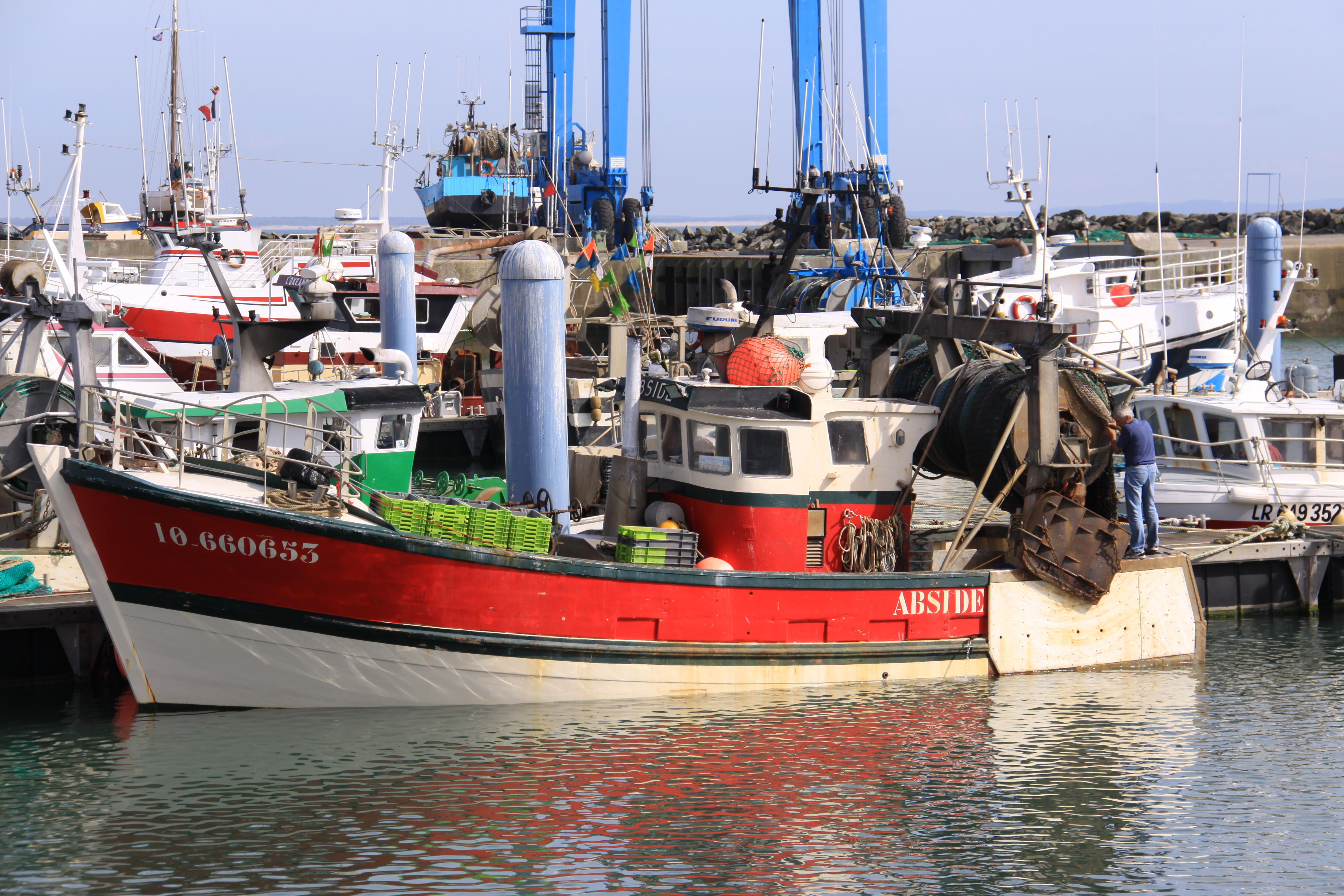 Dans le port de La Cotinière un chalutier prêt à partir pour une nuit de pêche. La Cotinière (Commune de Saint-Pierre d' Oléron), Île d'Oléron, Charente-Maritime, France.